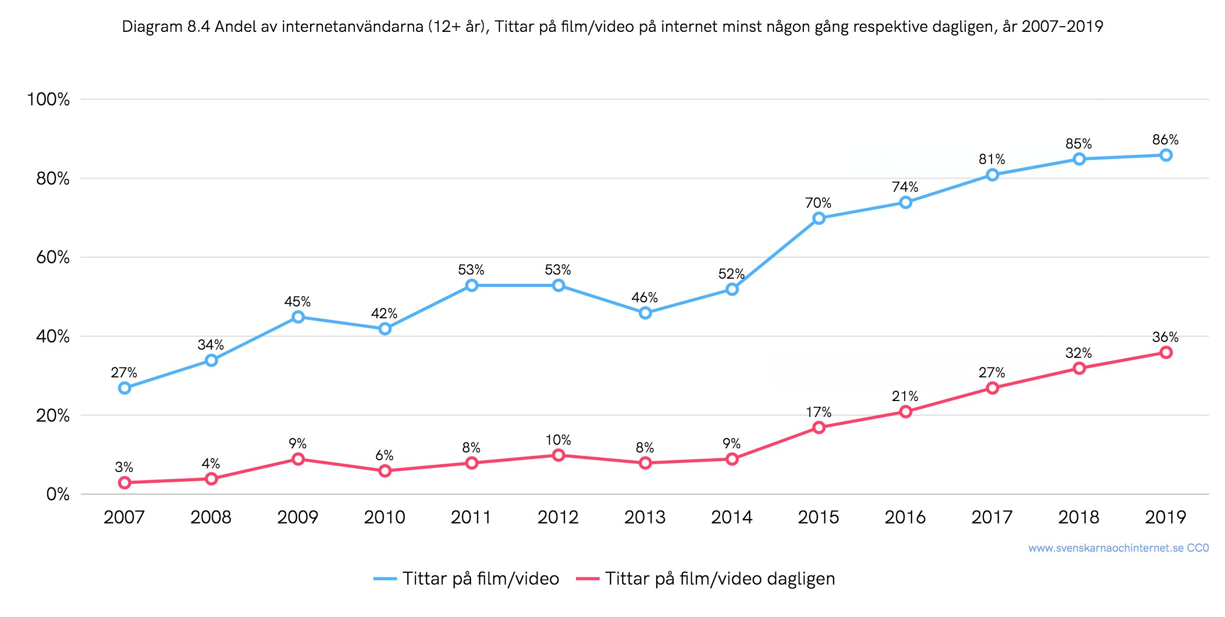 Andel av de svenska internetanvändarna (12+ år) som tittar på film/video på internet minst någon gång respektive dagligen, år 2007–2019. Siffror från undersökningen "Svenskarna och internet".